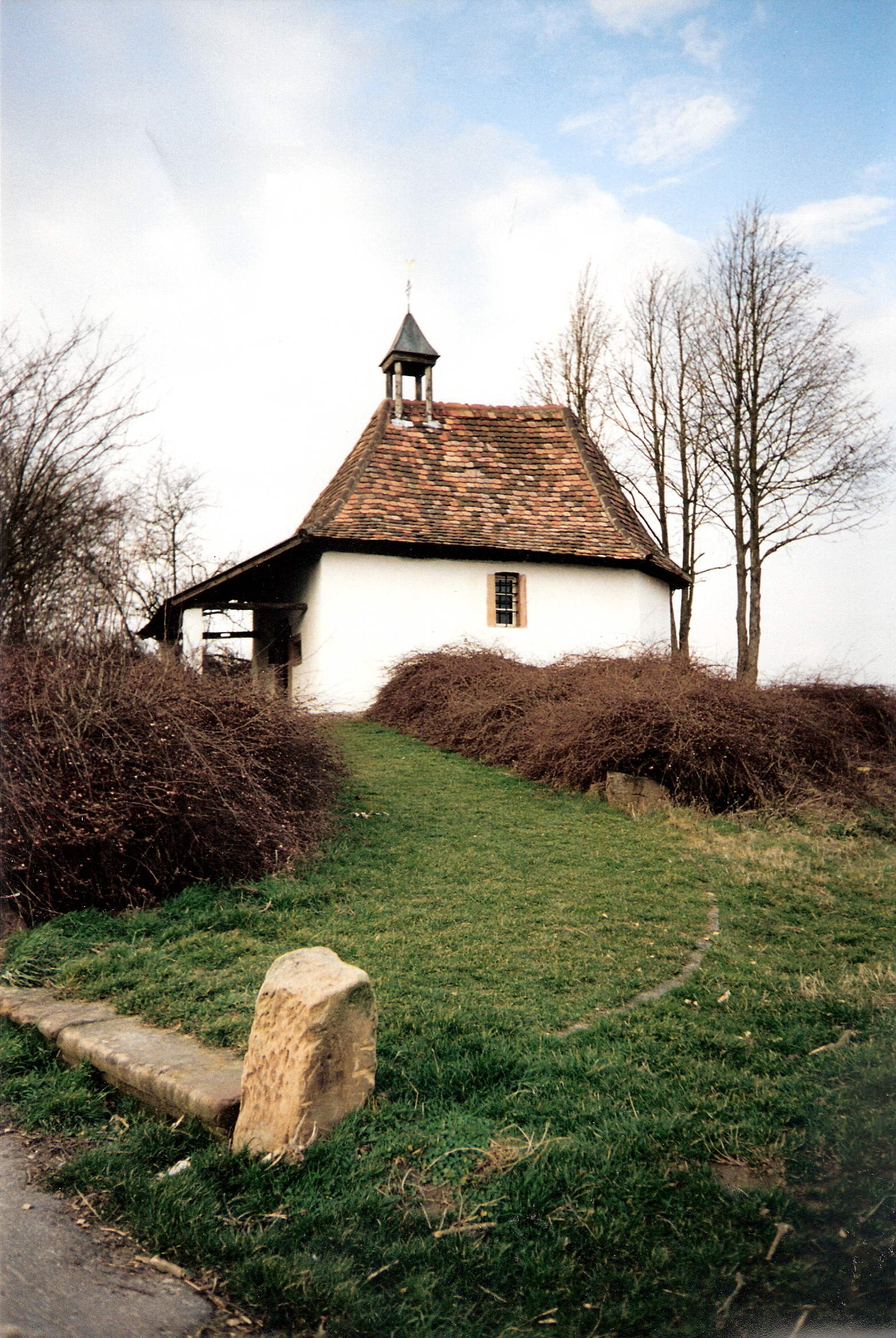 Landauer Kapelle – auch Loreto-Kapelle genannt, von Süden, 1985, Herxheim bei Landau/Pfalz; Hohlwegabschnitt des alten Landauer Weg